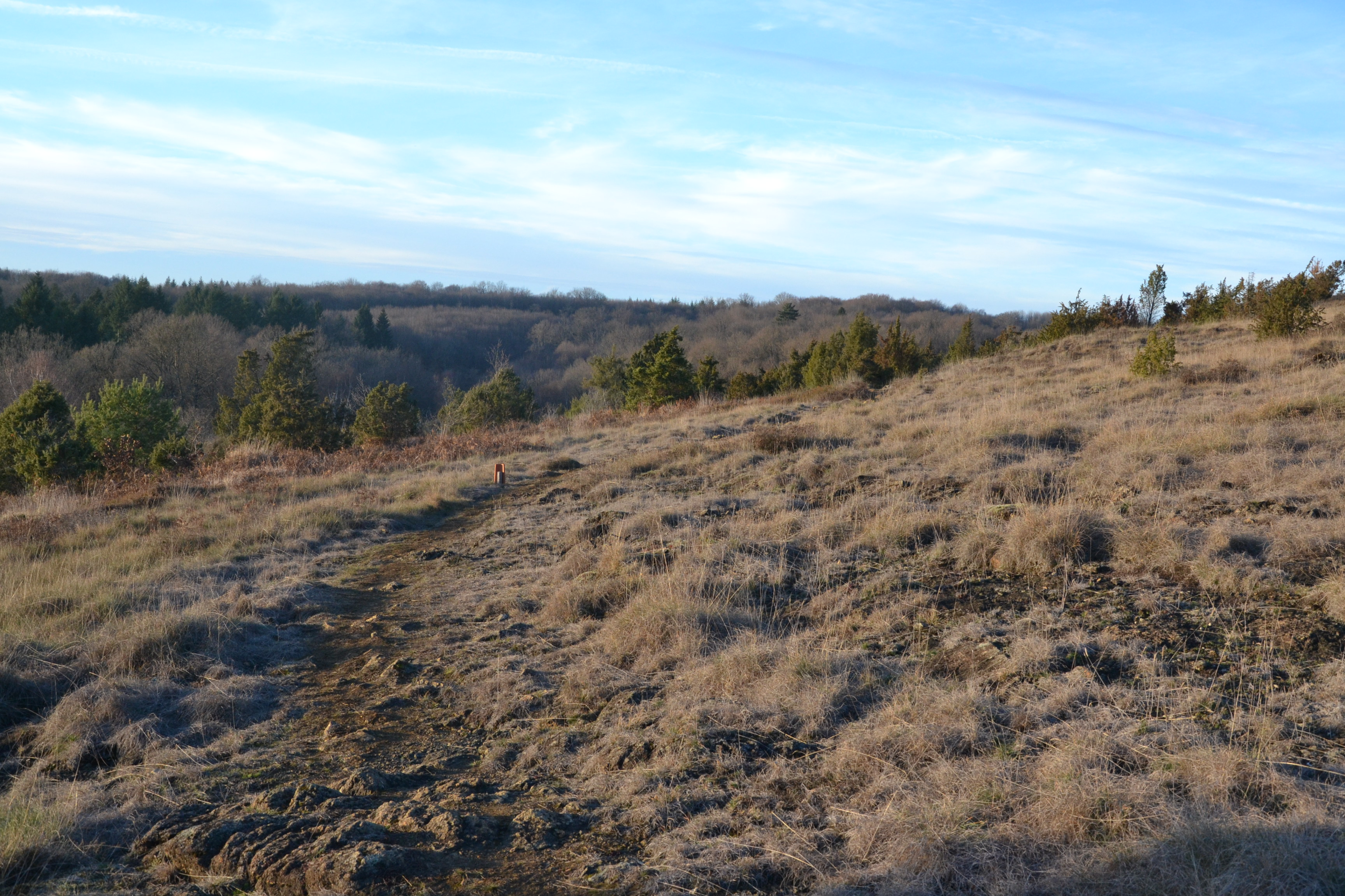 Paysage de la lande serpentinicole de la Flotte et du Cluzeau (Château-Chervix, Haute-Vienne, France).